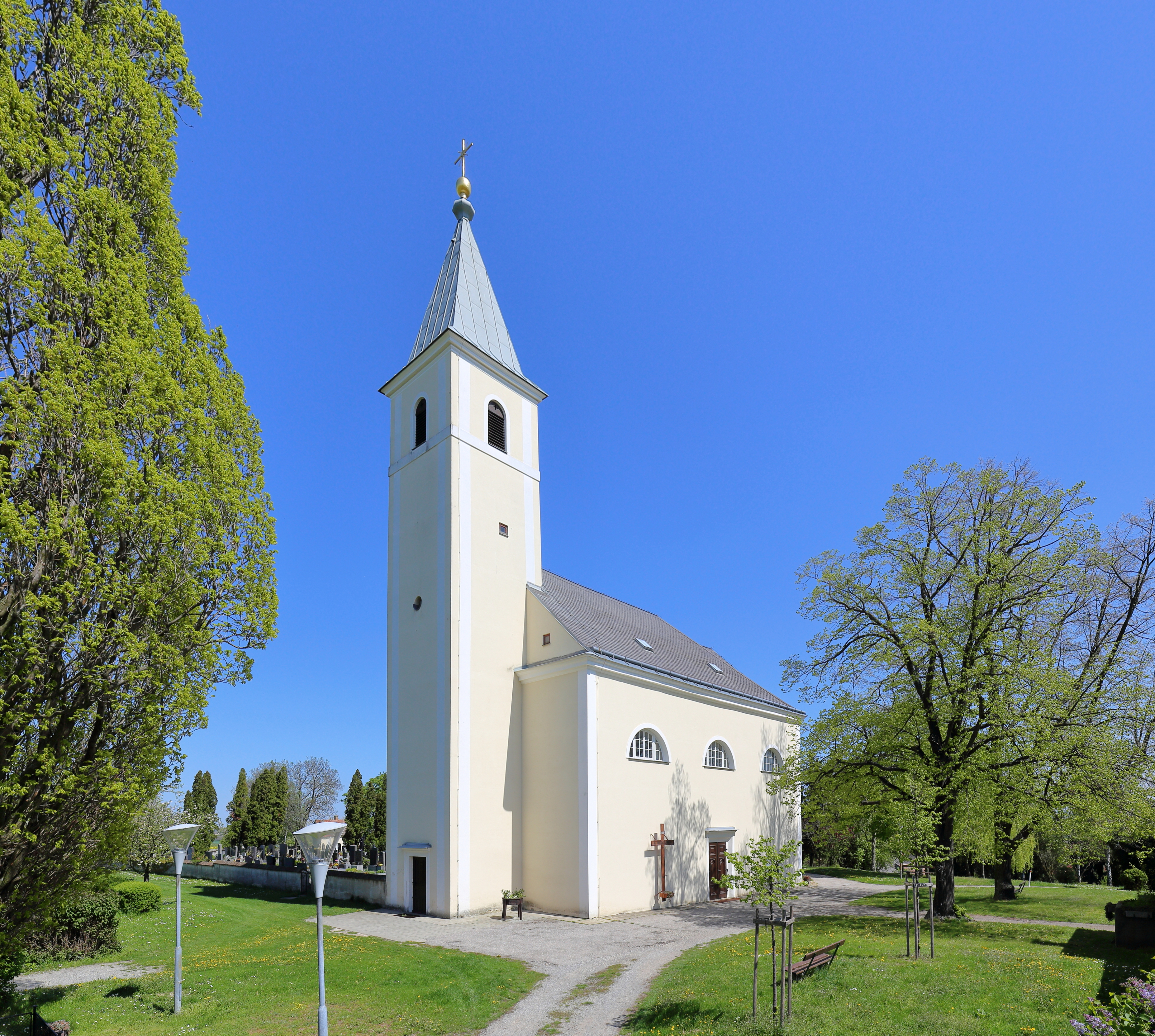 Südwestansicht der römisch-katholischen Pfarrkirche Mariae Geburt in Sierndorf an der March, ein Ortsteil der niederösterreichischen Marktgemeinde Jedenspeigen. Ein schlichter, einheitlicher Barockbau mit vorgestelltem Westturm und eingezogener Rundapsis, der Ende des 17. Jahrhunderts errichtet wurde.